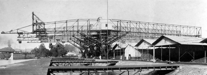 Repronegatief. Panoramafoto. De kolensteiger met electrische transporteurs in de haven van Sabang